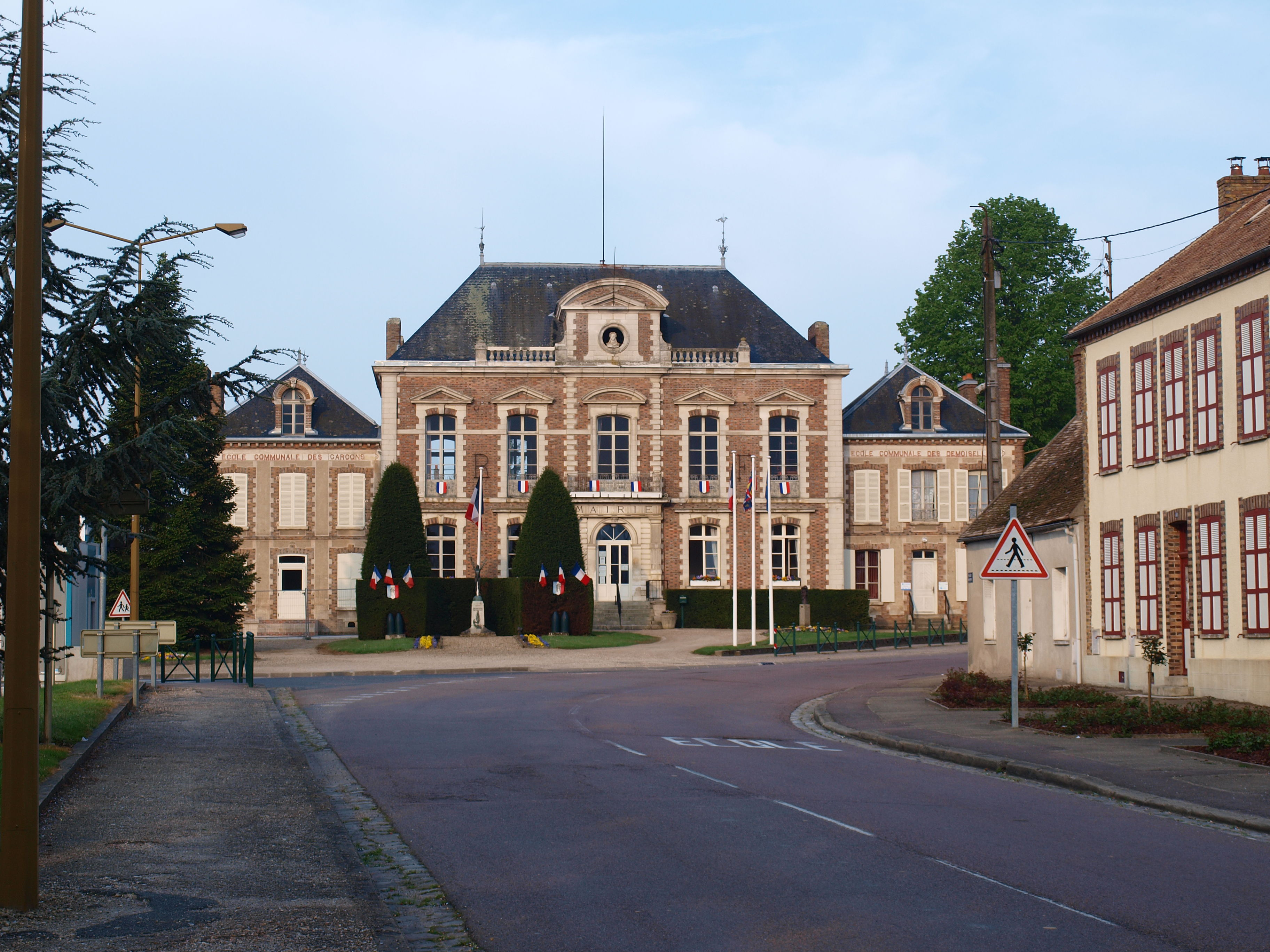 Chéroy (Yonne, France)